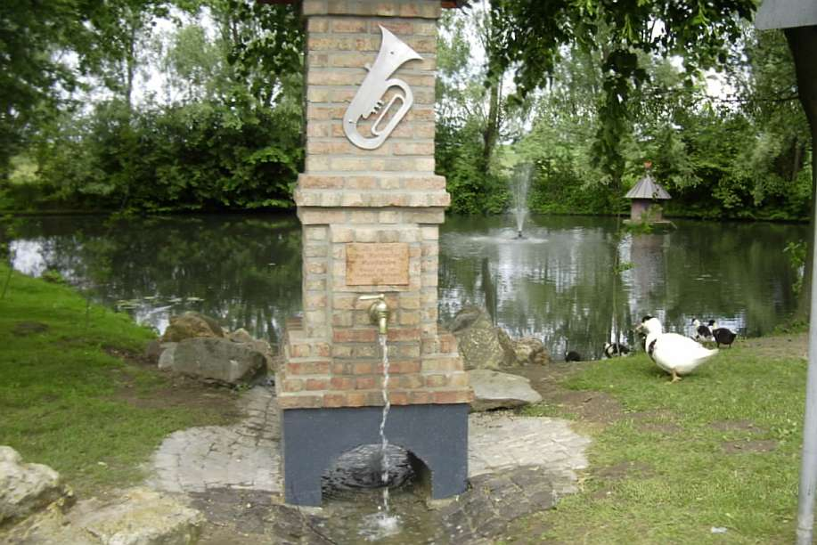 Summary Bildbeschreibung:"Musikantenbrunnen" am Schroof in Kofferen Quelle: eigenes Foto Fotograf/Zeichner: bodoklecksel 15:22, 5. Jun 2006 (CEST) Datum: Juni 2004 Sonstiges: ...